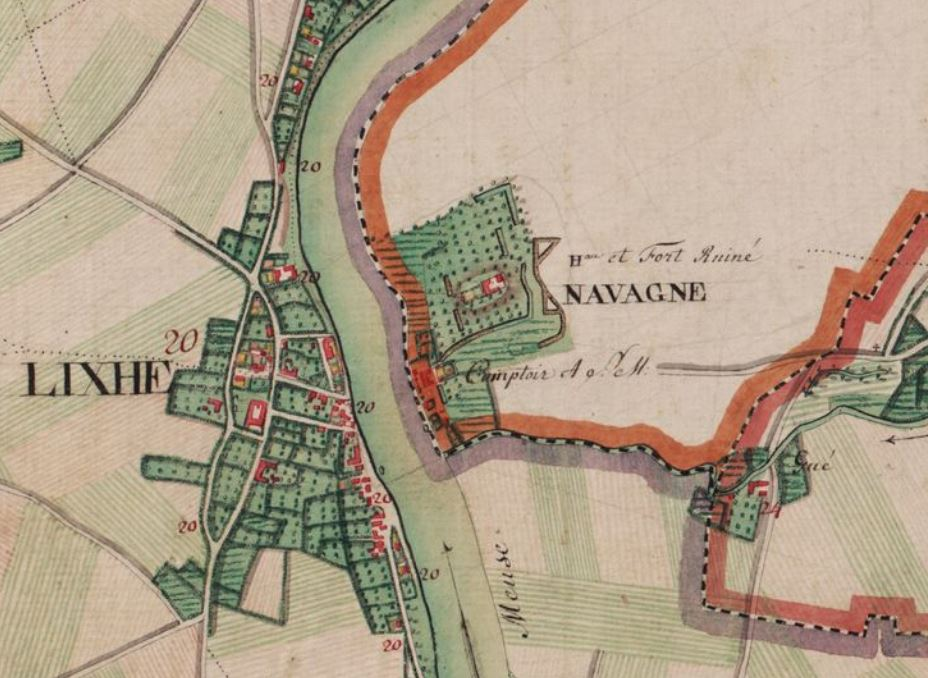 Uitsnede van de Ferraris Kabinetskaart Fort Navagne (Eijsden/Moelingen)